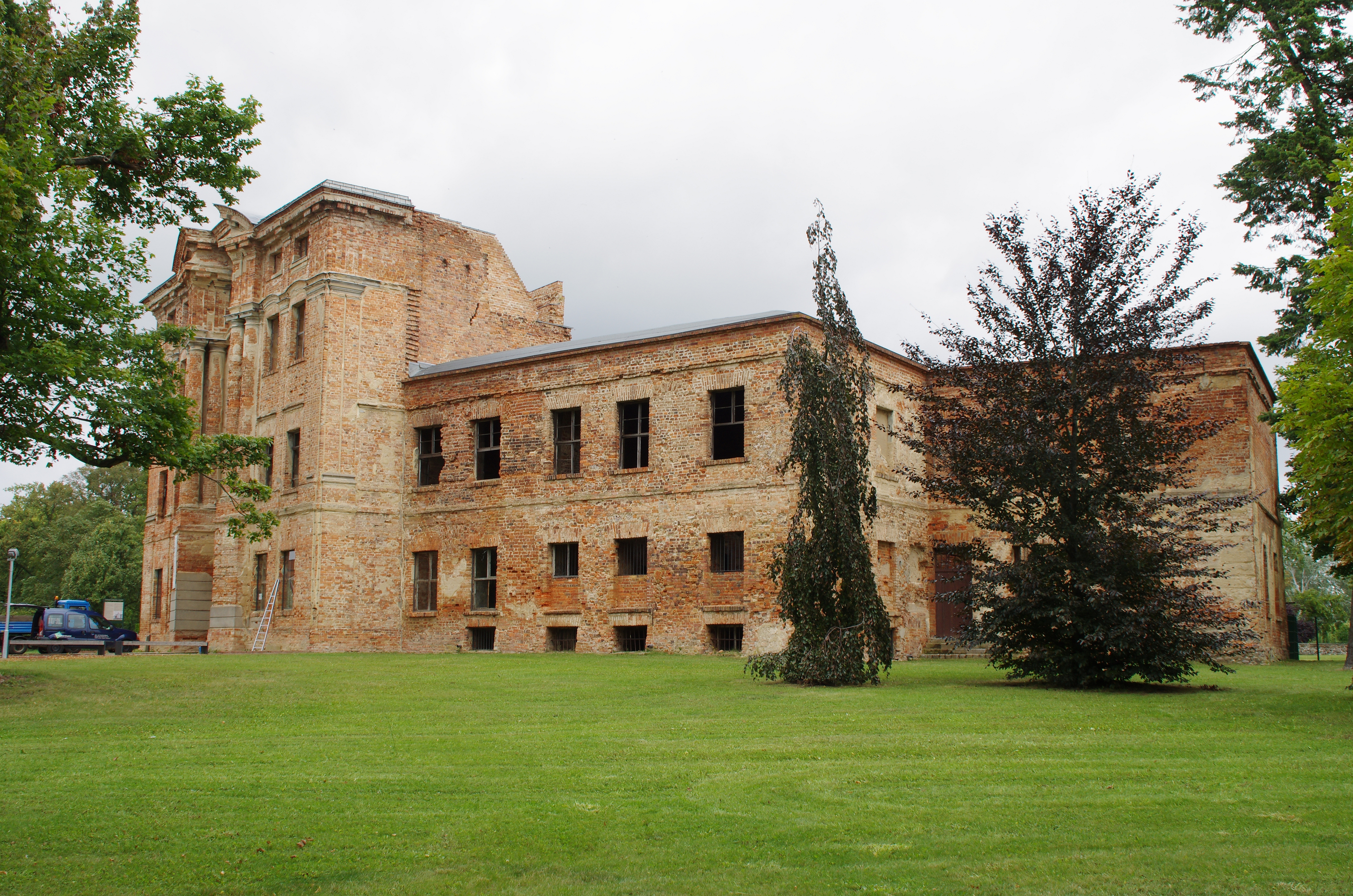 Dahme/Mark in Brandenburg. Das Haus in der Straße steht unter Denkmalschutz.